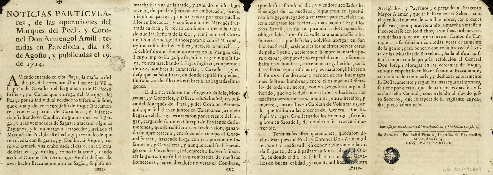 Butlletí especial de la Gazeta de Barcelona informant de la batalla de Talamanca i la ràpida arribada de les tropes del marquès del Poal.